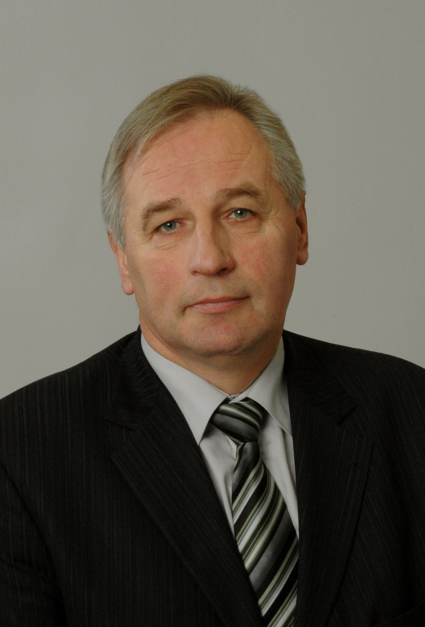 10.Saeimas deputāts Staņislavs Šķesters